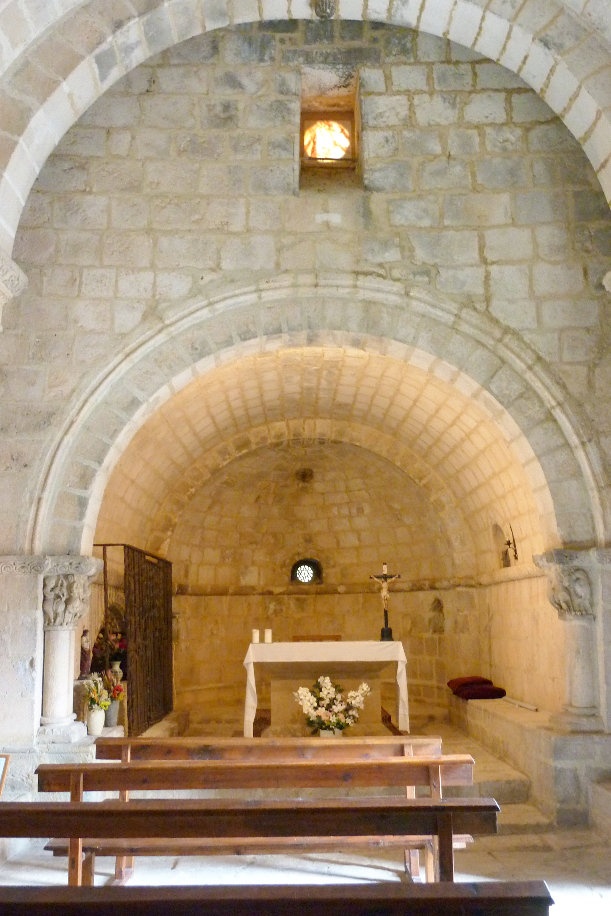 Kirche San Bartolomé in Campisábalos in der Provinz Guadalajara in Spanien